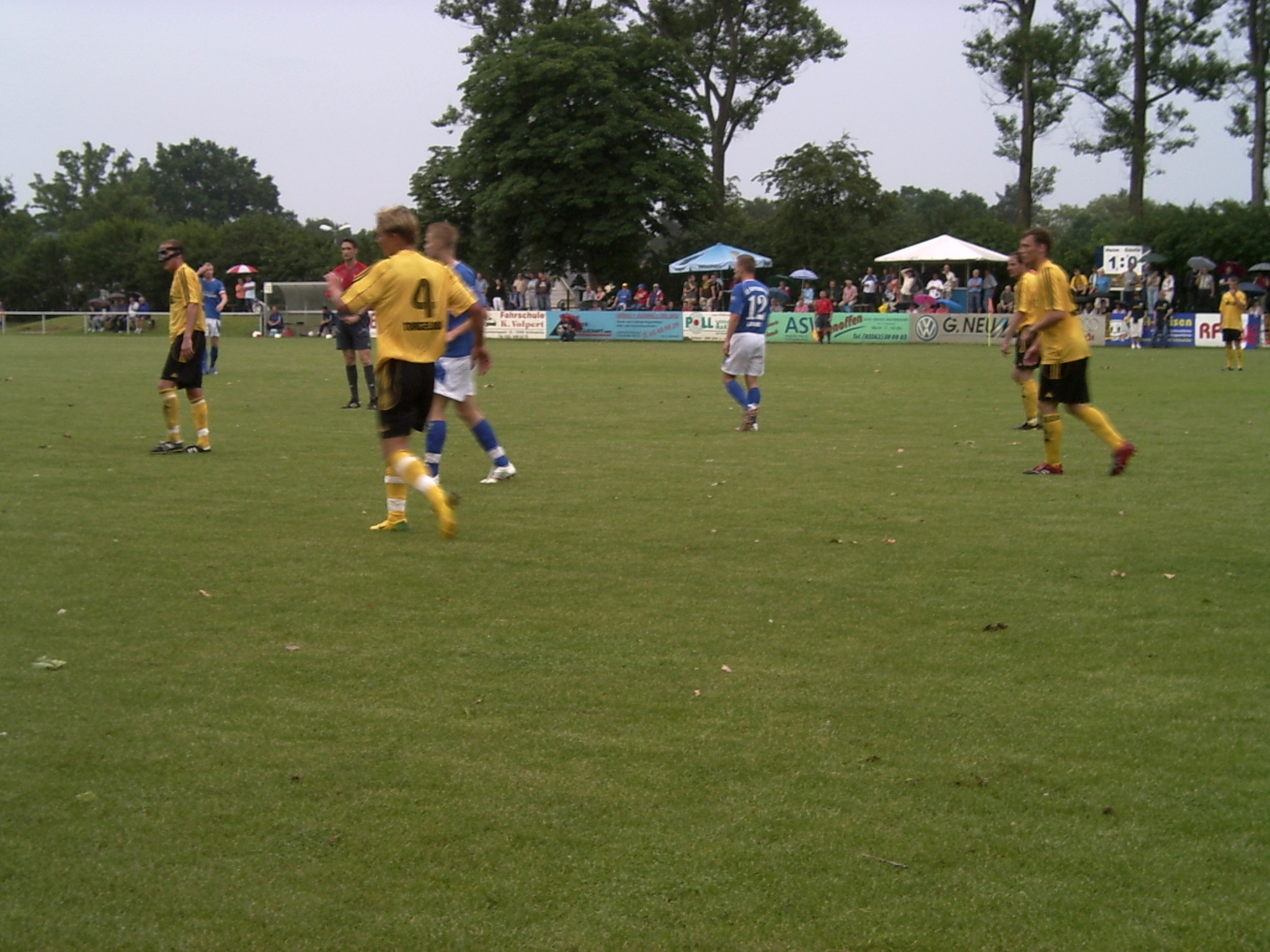 Oberligaspiel Germania 90 Schöneiche (blau-weiß) - Torgelower SV Greif (gelb-schwarz) am 30. und letzten Spieltag (27. Mai) der Saison 2006/07 im Jahn-Stadion in Schöneiche, Endstand 1:0 Schöneiche: 12 Philipp Karras Torgelow: 4 Vincent Lipp